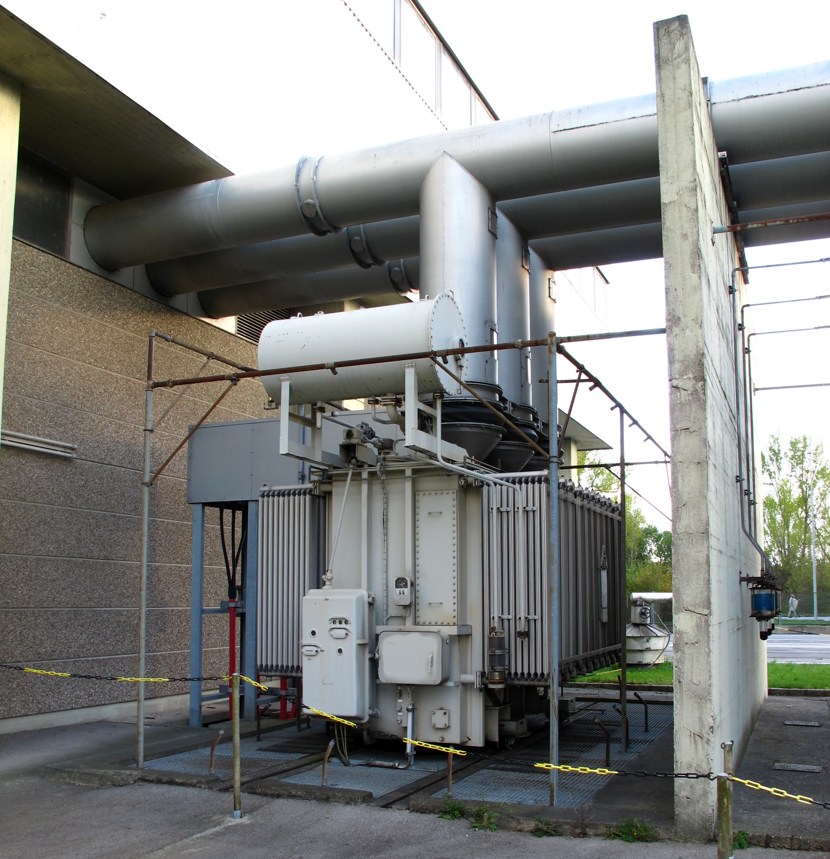 Kraftwerk Donaustadt, stillgelegter Eigenbedarfstransformator von Block 2. Oben die Generatorleitung mit Kühlrohren. Links die Wand zur Maschinenhalle mit Generator im Inneren. Rechts von der Betonwand (Brandschutzmauer) befindet sich der Maschinentransformator